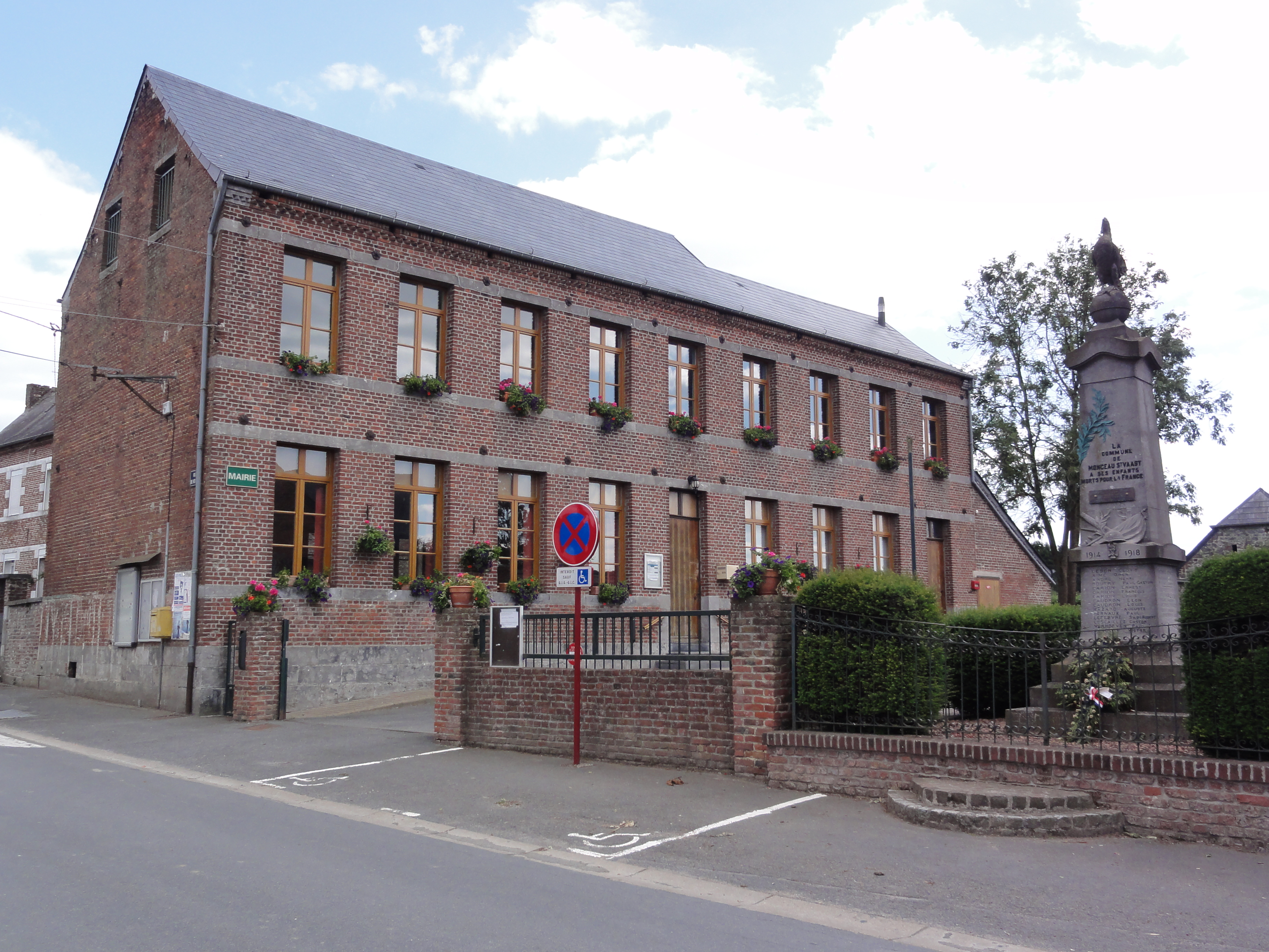 Monceau-Saint-Waast (Nord, Fr) mairie et mon aux morts